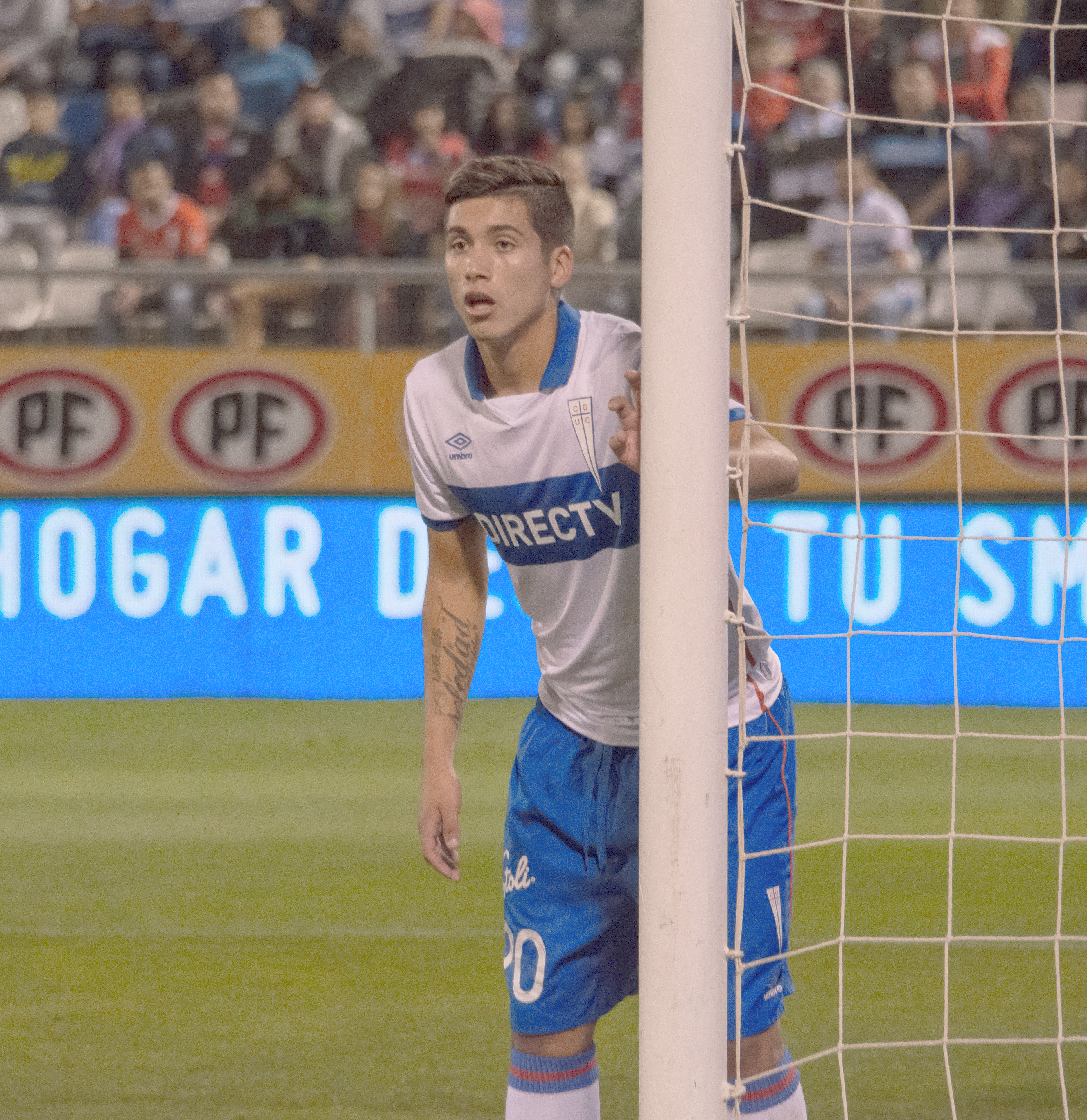 Universidad Católica v Huachipato, Estadio San Carlos de Apoquindo, Las Condes, Santiago, Chile.